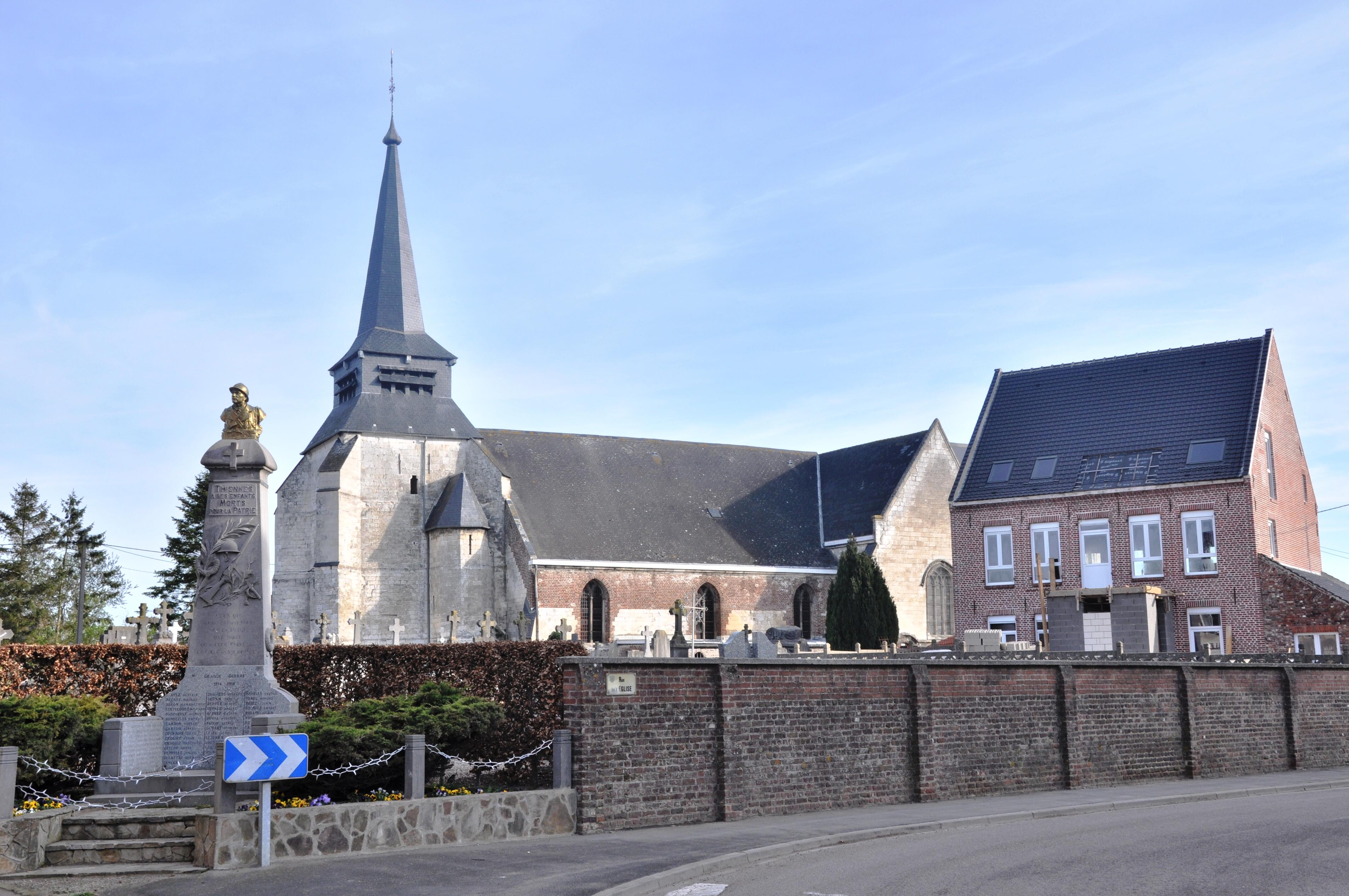 Centre du village de Thiennes